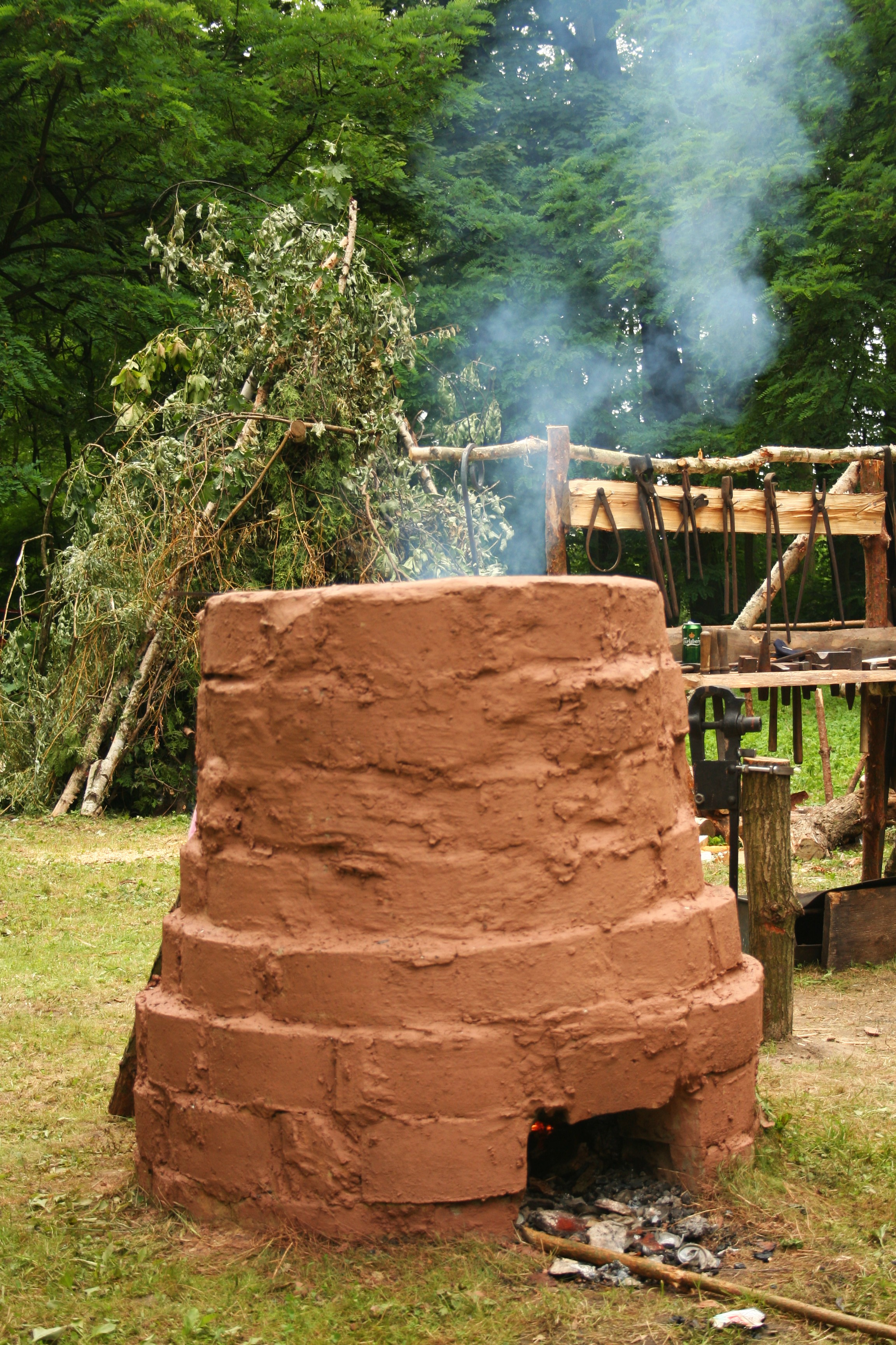 Święto "Śląska" - piec do wytopu żelaza, fragment pokazu dawnych technik hutniczych